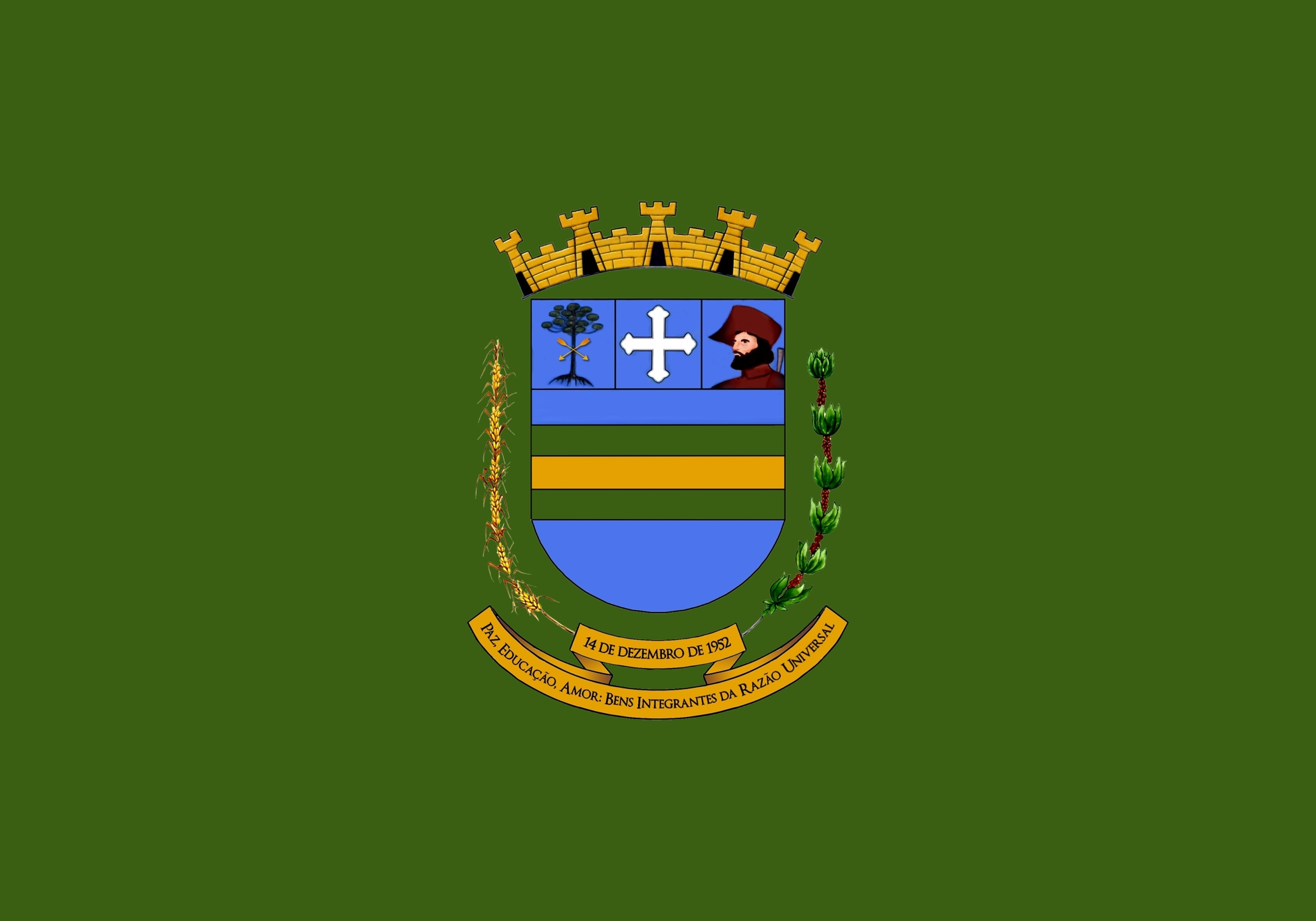 Bandeira do Município de Peabiru - PR